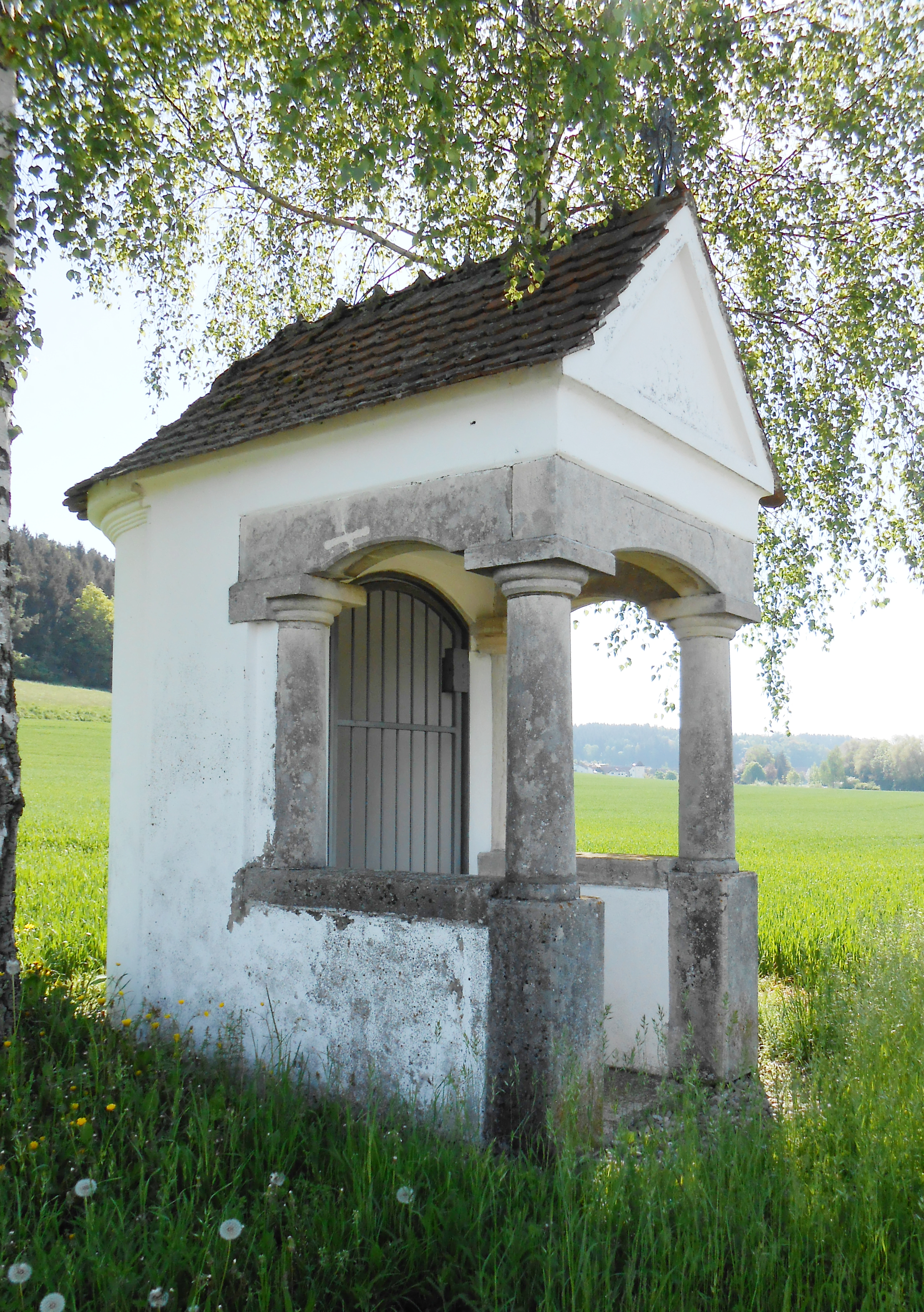 von Schnuttenbach her betrachtet